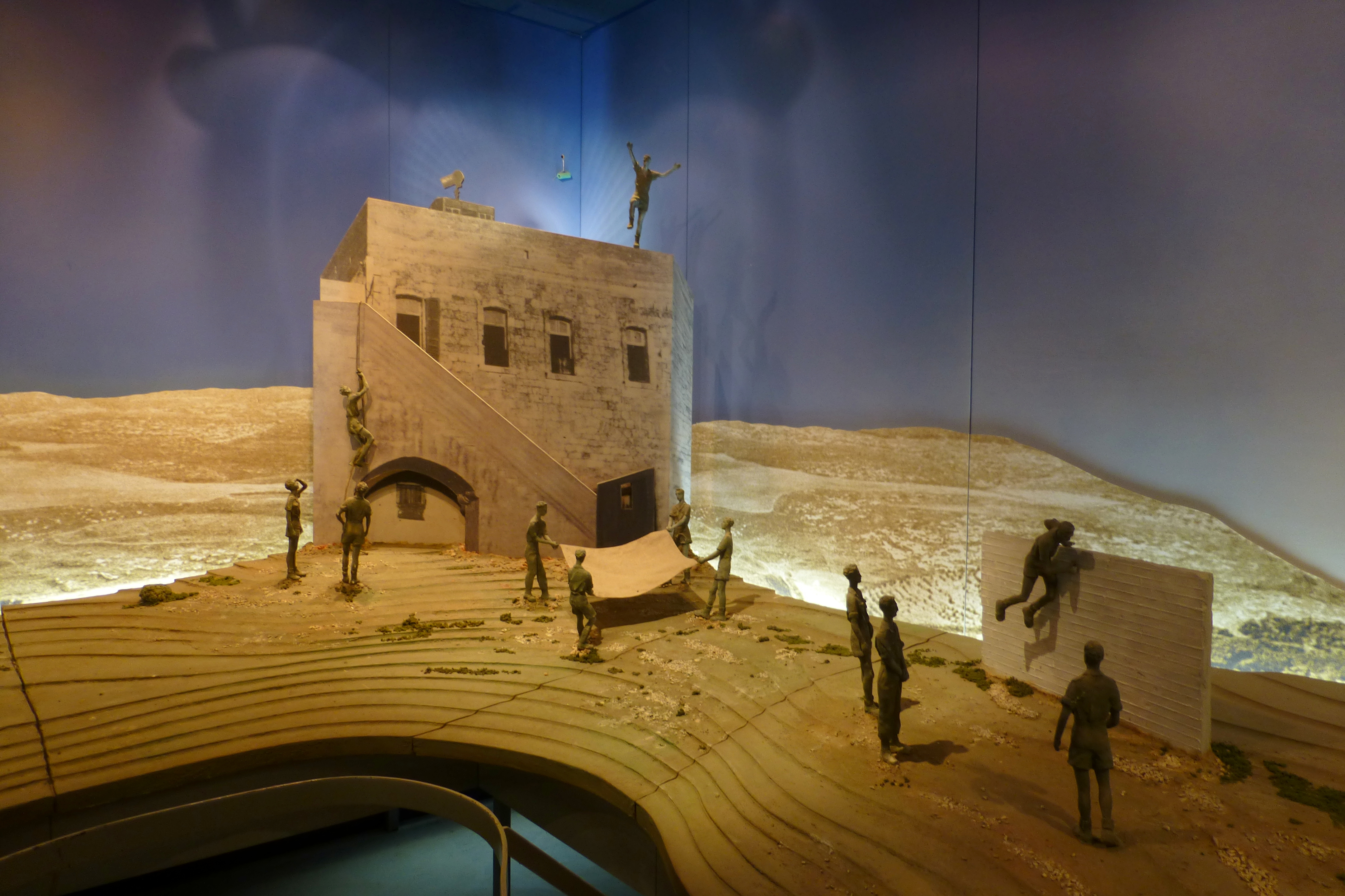 ג'וערה הוא בסיס גדנ"ע ומוזיאון הנמצאים על גבעה ברמות מנשה, במיקום היסטורי ששימש בעבר כבסיס ההדרכה המרכזי למפקדים של ארגון "ההגנה". שמה העברי של הגבעה הוא "גבעת נֹח".